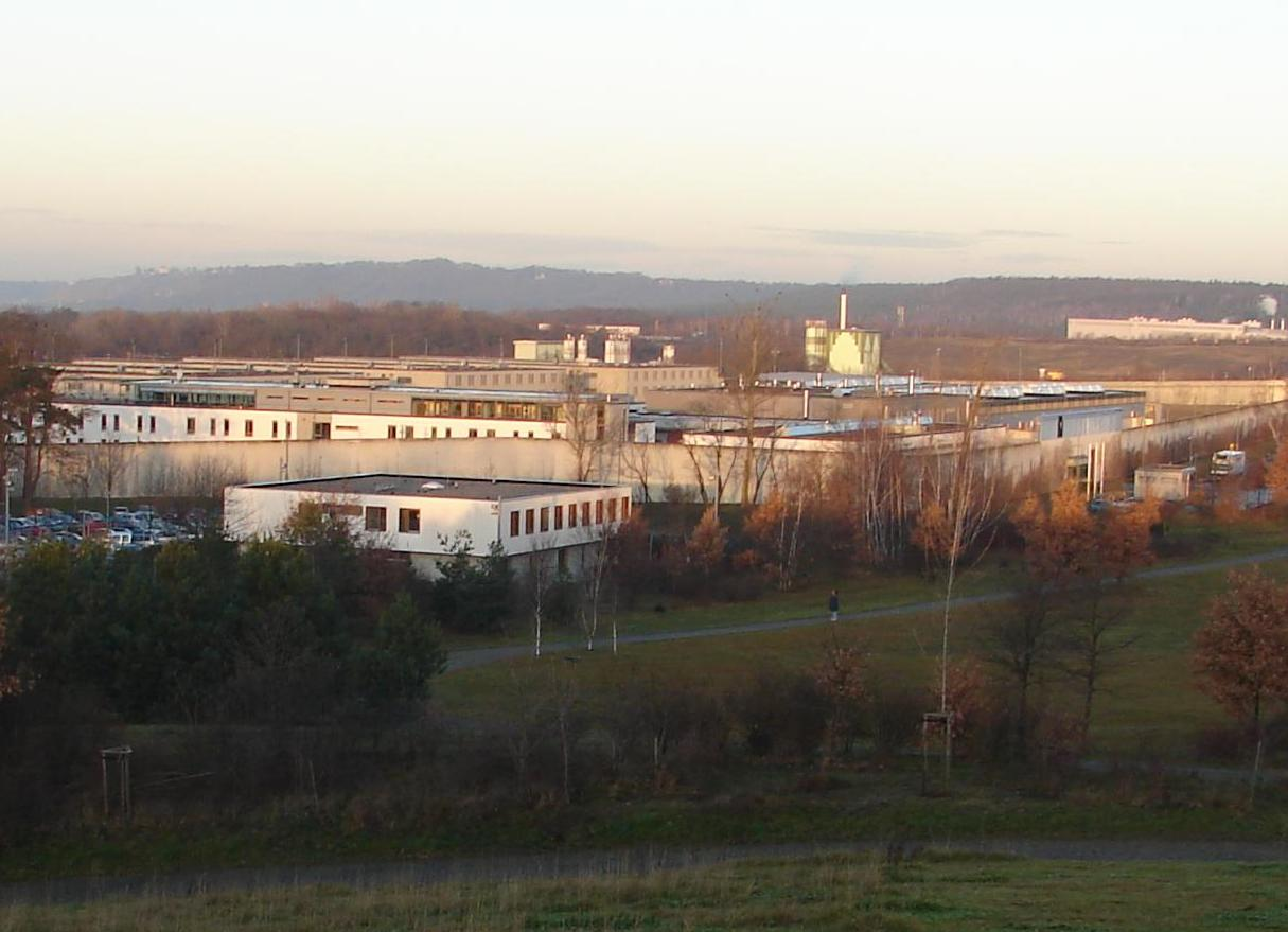 Blick von der ehemaligen Halde am Proschhübel nach Nordwesten auf die JVA Dresden am Hammerweg, im Hintergrund die Radebeuler Lößnitzhöhen